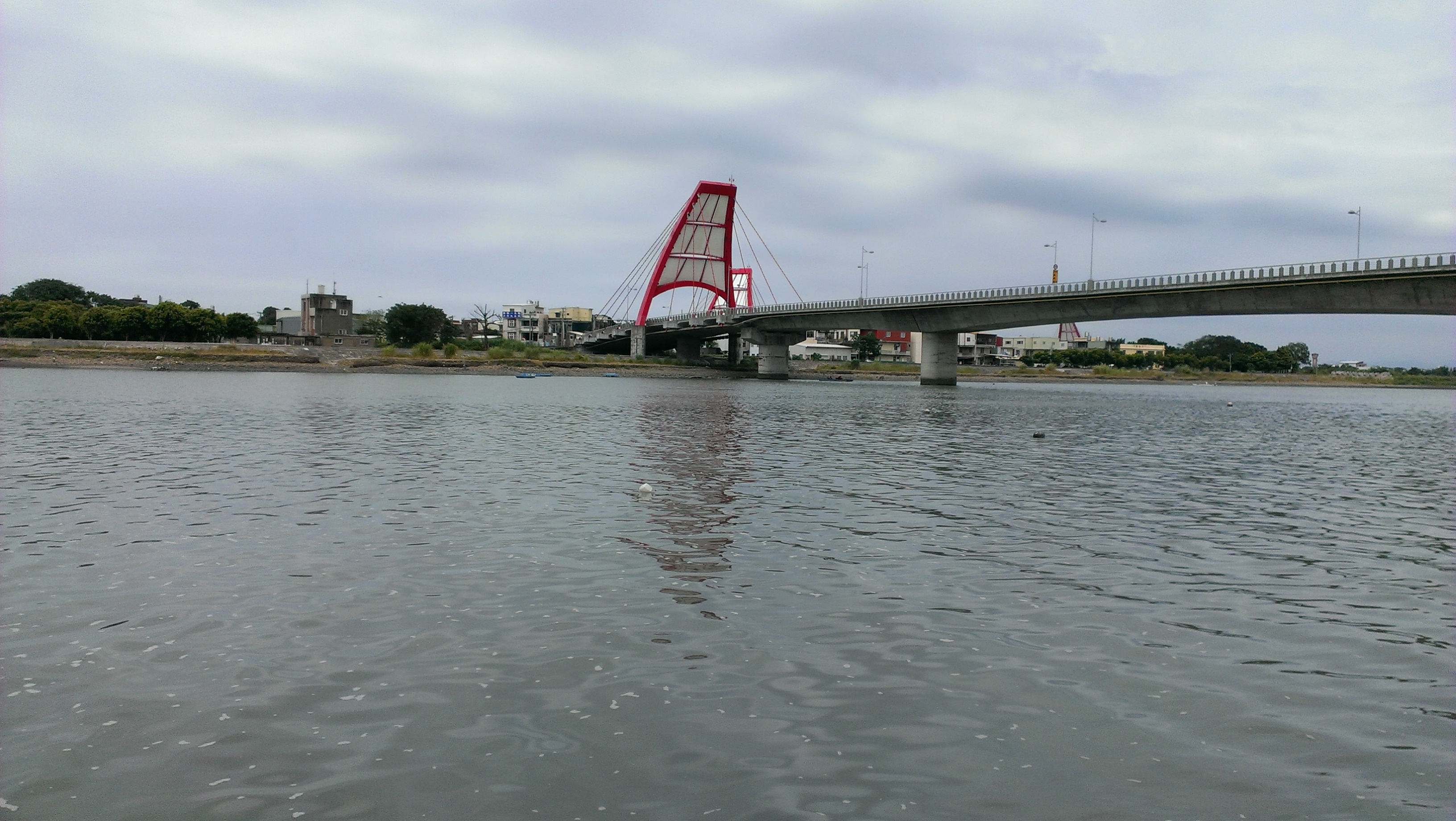 中文（台灣）: 位處頭前溪之舊港大橋(前面)與白地橋(最後面)